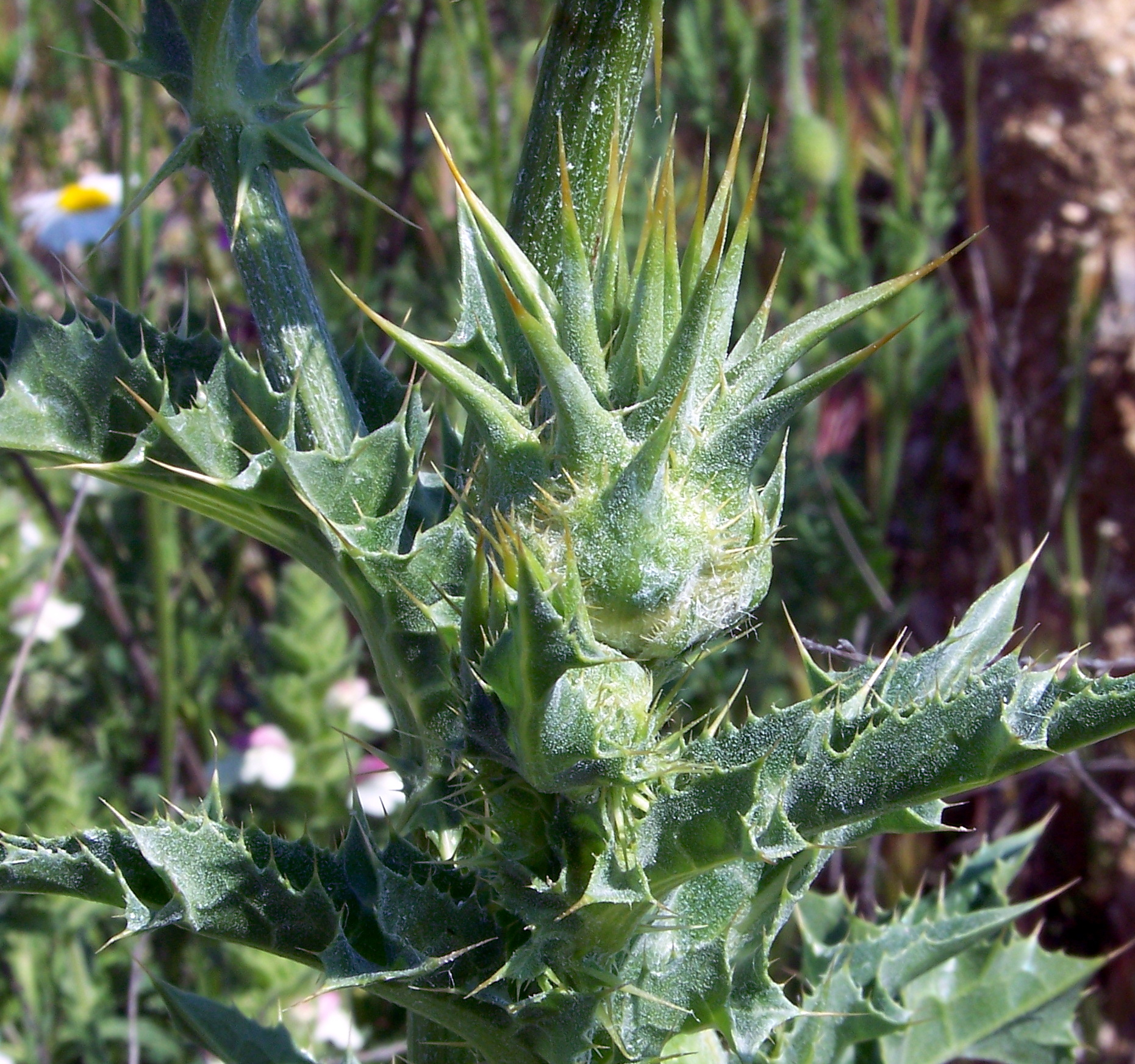 Silybum marianum : preantesis - Rejas (Madrid, España).